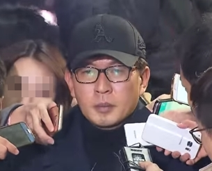 2016년 11월 8일, 조사를 위해 서울중앙지검에 체포된 차은택